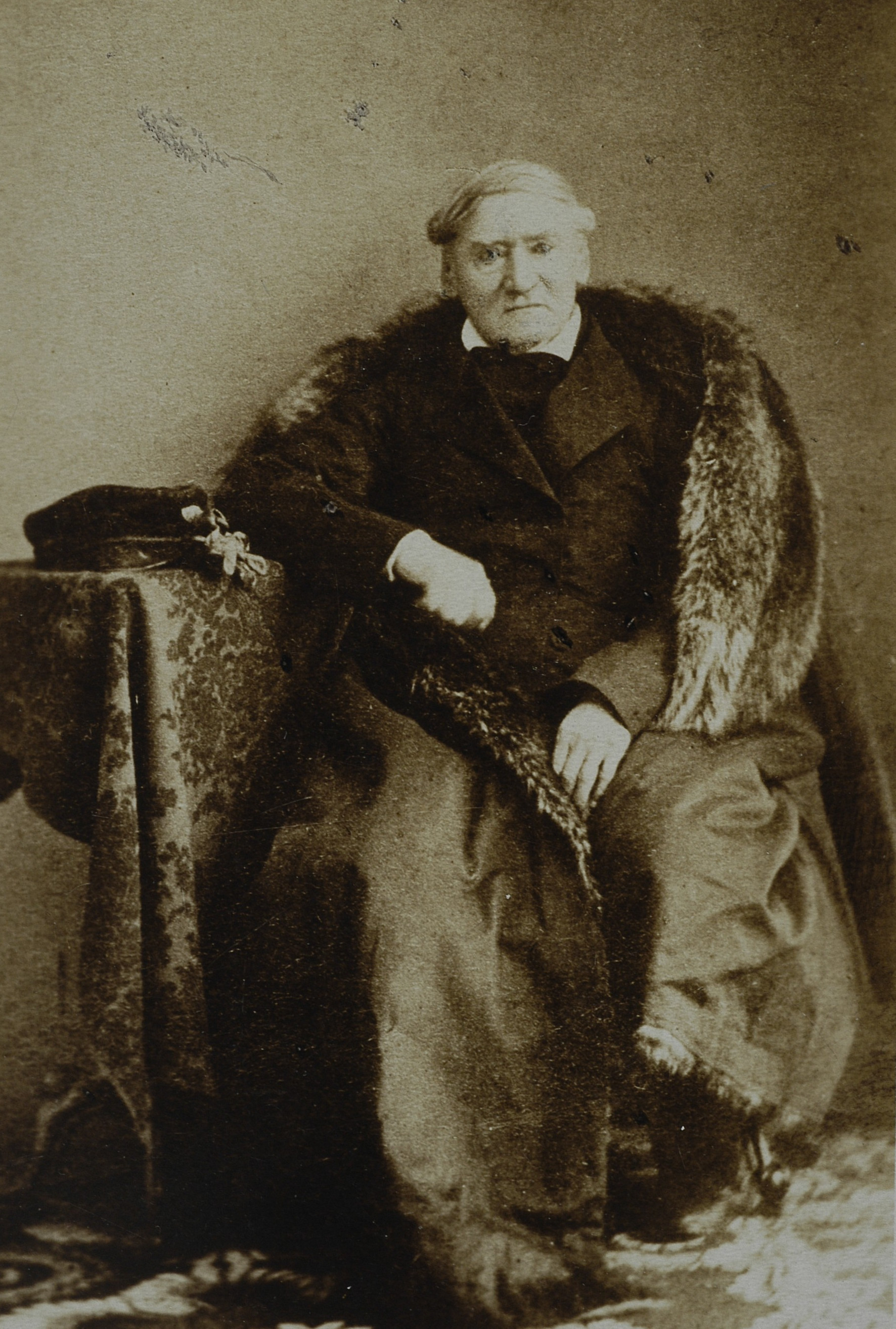 Onufry Pietraszkiewicz